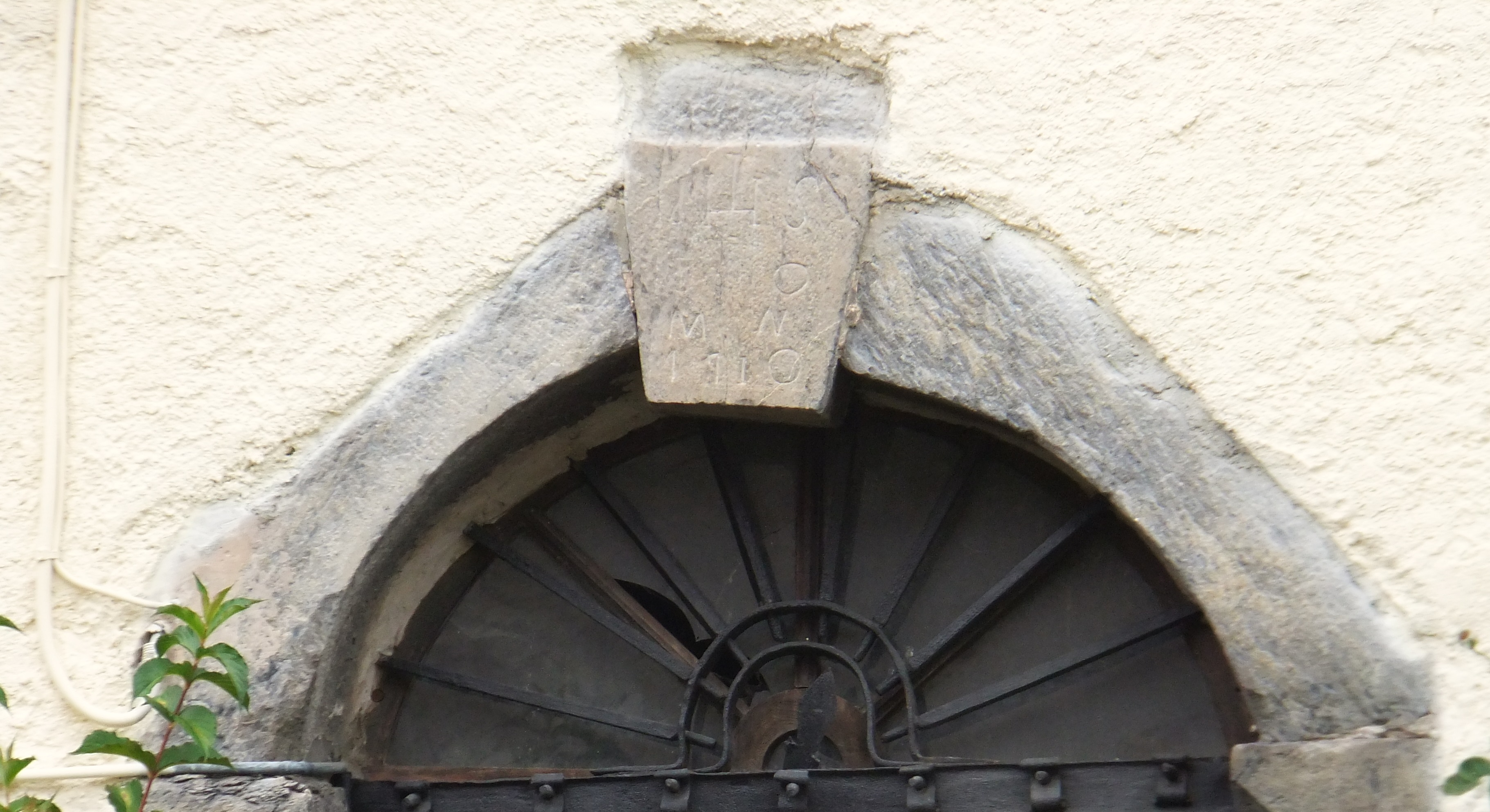 Clef d'arc, portant la date de 1710 et le monogramme I H S (=Jésus) surmonté d'une croix au centre du H, de la voussure de la porte d'entrée d'une maison de la Grand-Rue, construite dans l'angle avec la rue de la Charrière.